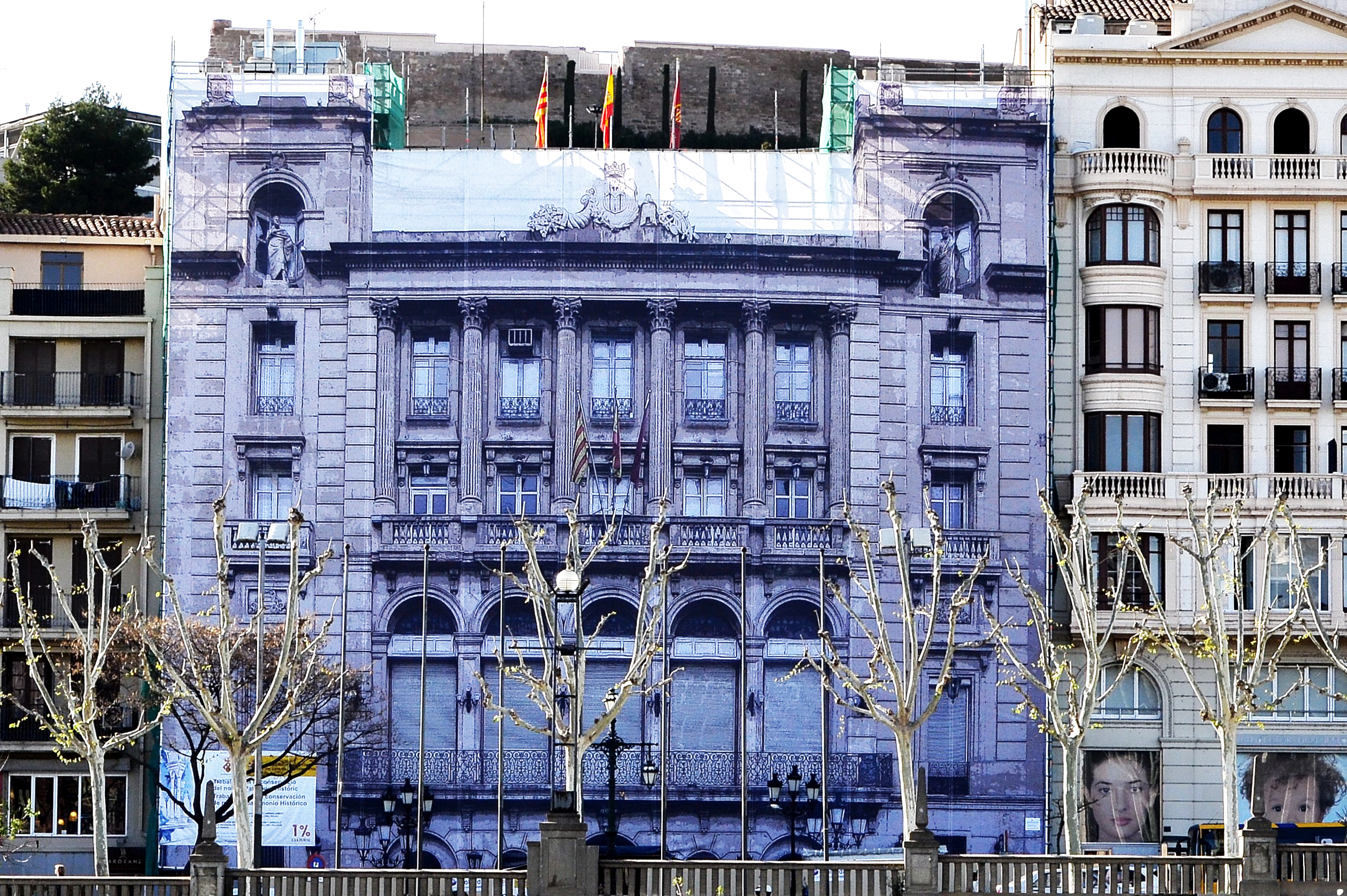 Detalle toldo protector en la restauración fachada de la Paeria de Lleida (Avd. Blondel-año 2011)